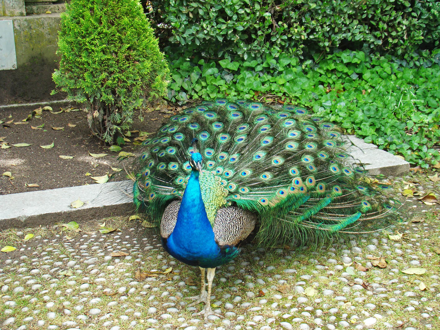 Un pavo real con su cola a medio extender en el parque de Valladolid Campo Grande.